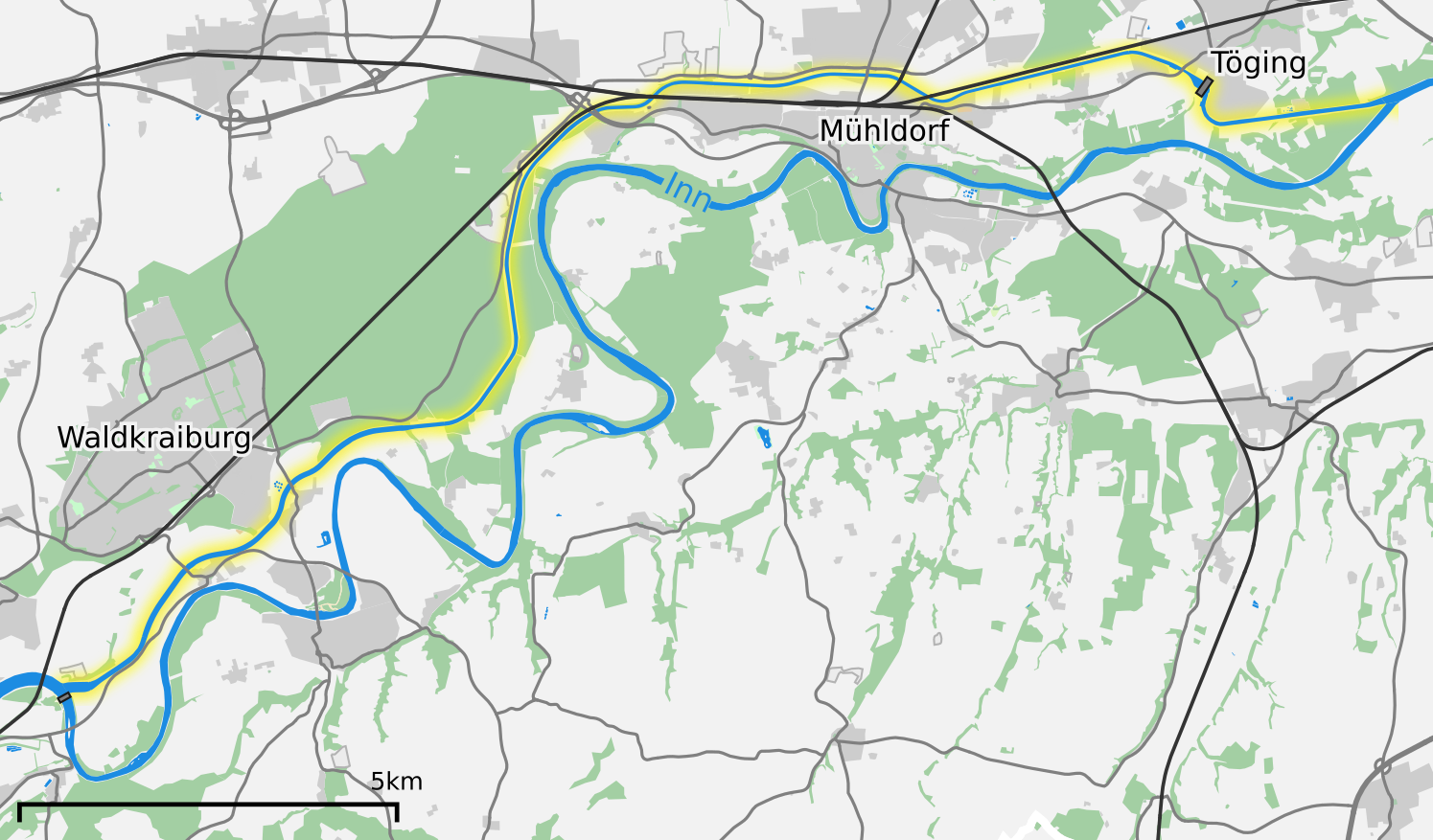 Karte des Innkanals